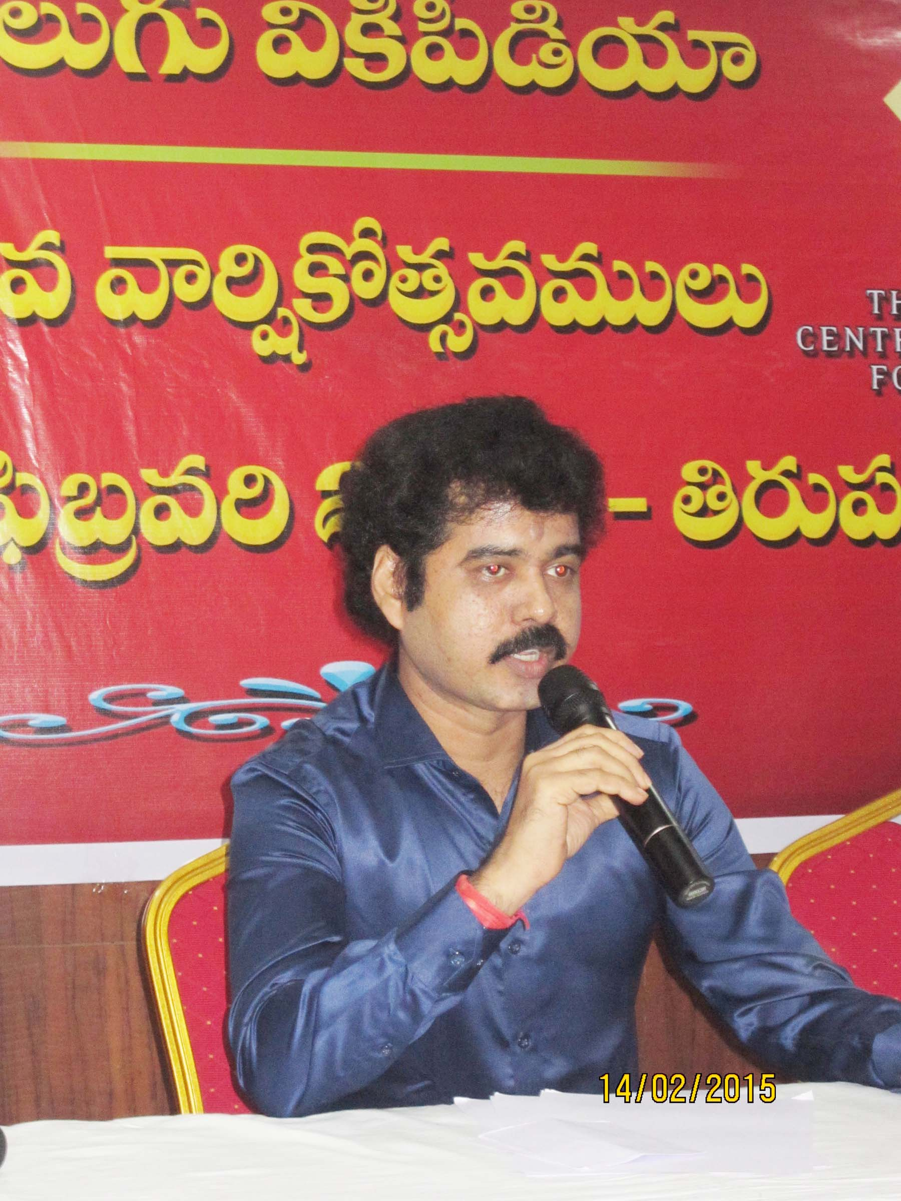 తెవికీ 11వ వార్షికోత్సవాలు